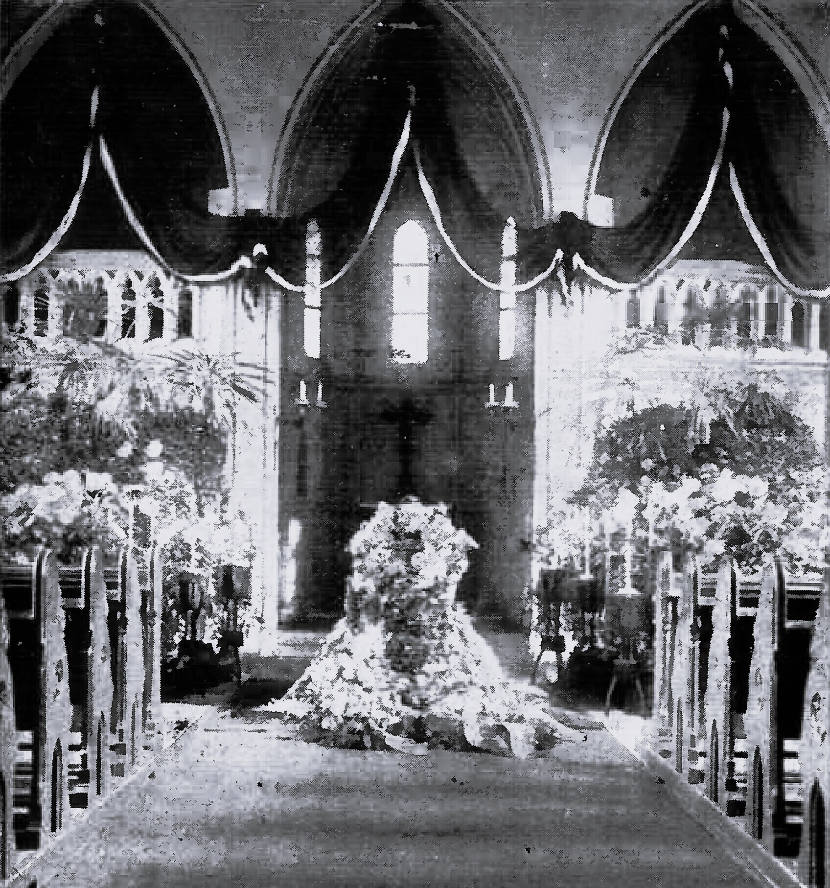 Aufbahrung des Staatsrats Dr. Edvard Hjelt-Helsingfors in der Kapelle des Allgemeinen Gottesackers in Lübeck. Am 8. Juli 1921 fand in Lübeck in der Burgtorkapelle vor der Überführung seiner Leiche nach Finnland eine Trauerfeier statt. An ihr nahmen Vertreter des Senats und vieler Behörden, die Konsuln der nordischen Reiche und Vertreter von Großfirmen teil. Pastor Johannes Pautke von St. Marien und der Staatssekretär des Auswärtigen (Außenminister) a. D. Paul von Hintze widmeten dem Toten Worte des Gedenkens. Der Dampfer „Poseidon“ brachte den unermüdlich Vorkämpfer für die Freiheit Finnlands und Deutschenfreund am nächsten Tag nach Hause.